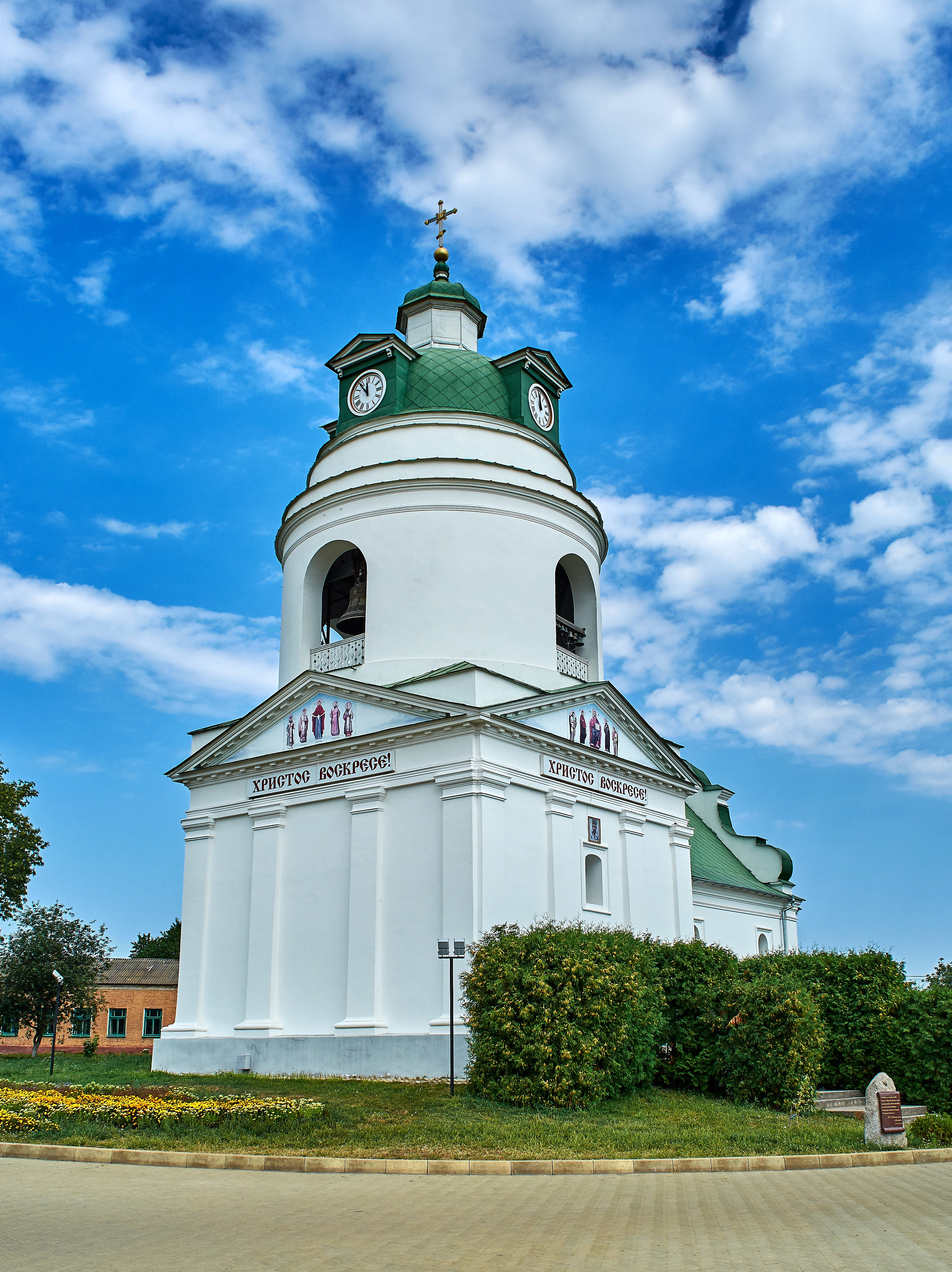 Миколаївська церква (мур.), Прилуки, вул. Галаганівська, 16